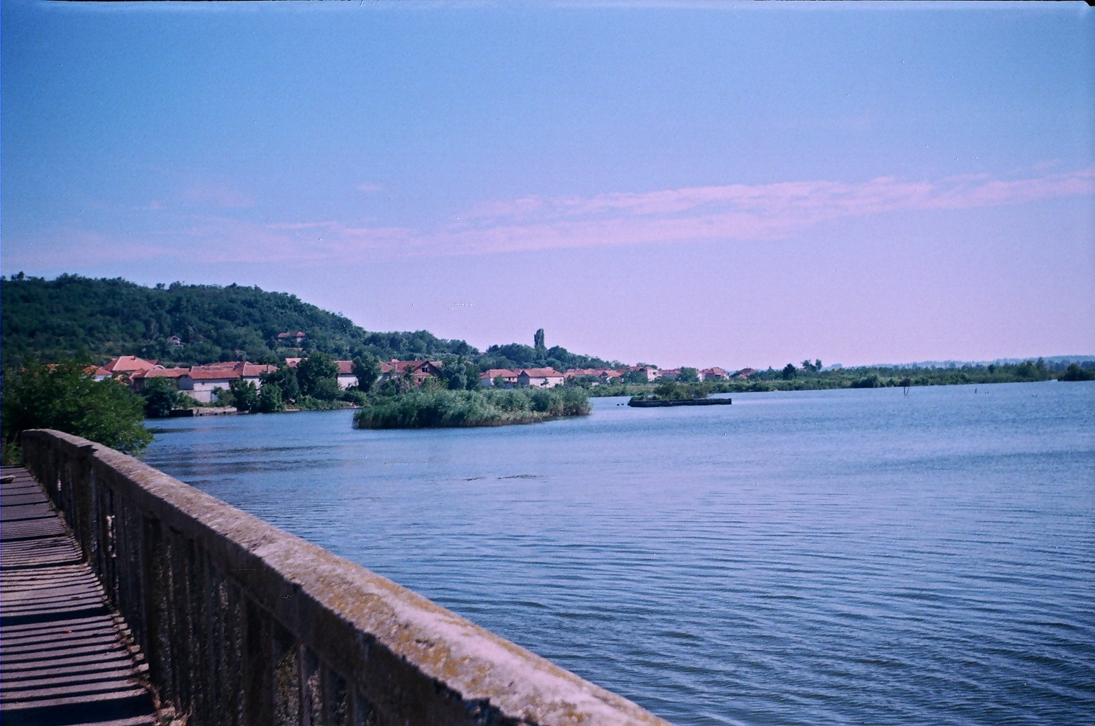 Стари Михајловац код Неготина.